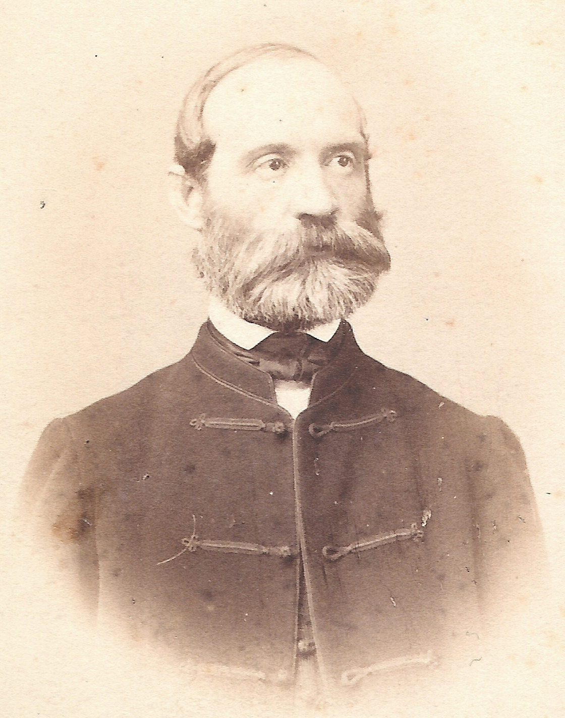 Hunfalvy János (Nagyszalók, 1820. január 21. – Budapest, 1888. december 6.) a magyar tudományos földrajz megalapítója, a Magyar Tudományos Akadémia (MTA) tagja.